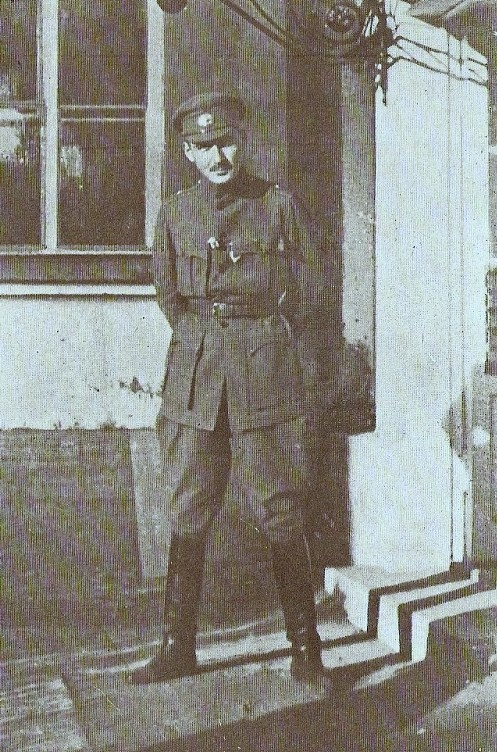 Сергей Анатольевич Неклюдов (1890—1916)